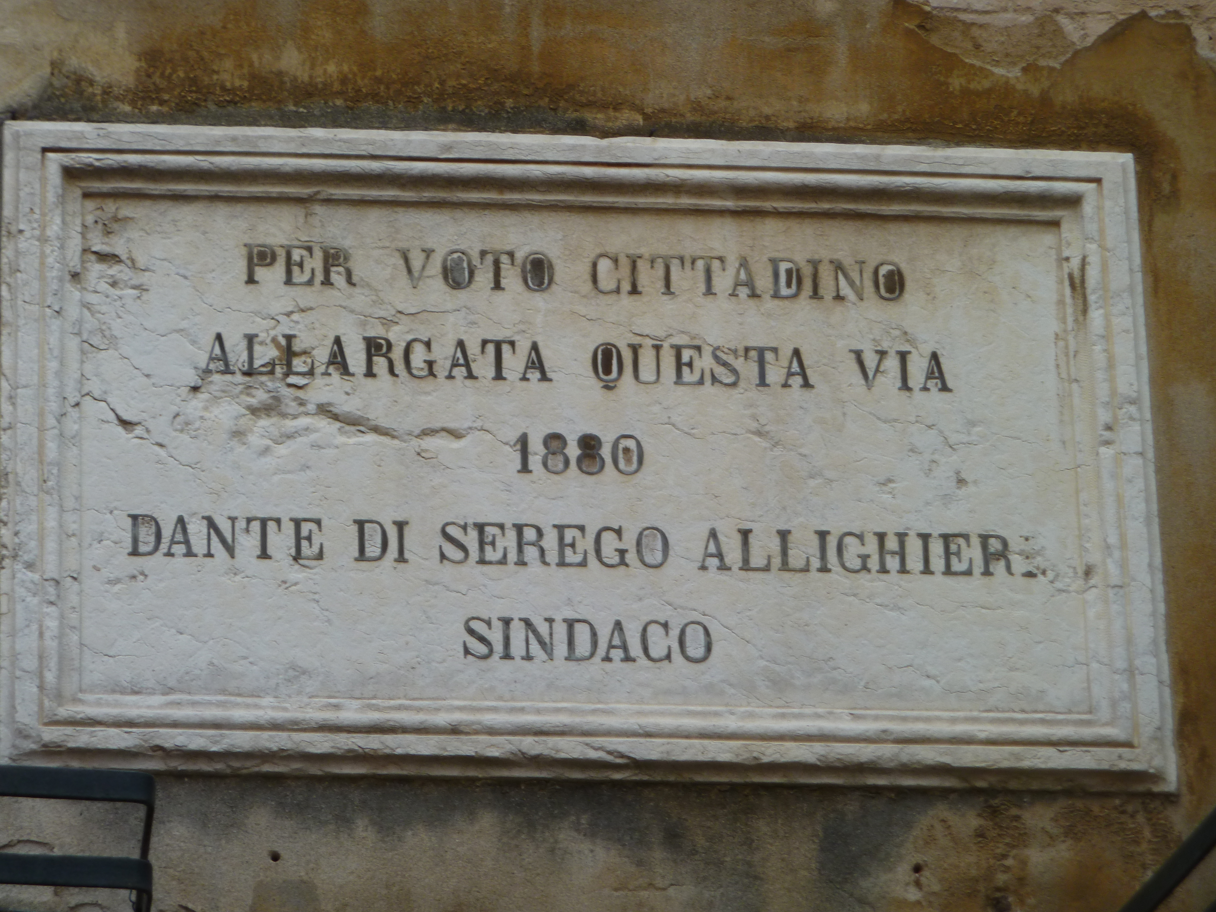 Dante Venezia San Marco